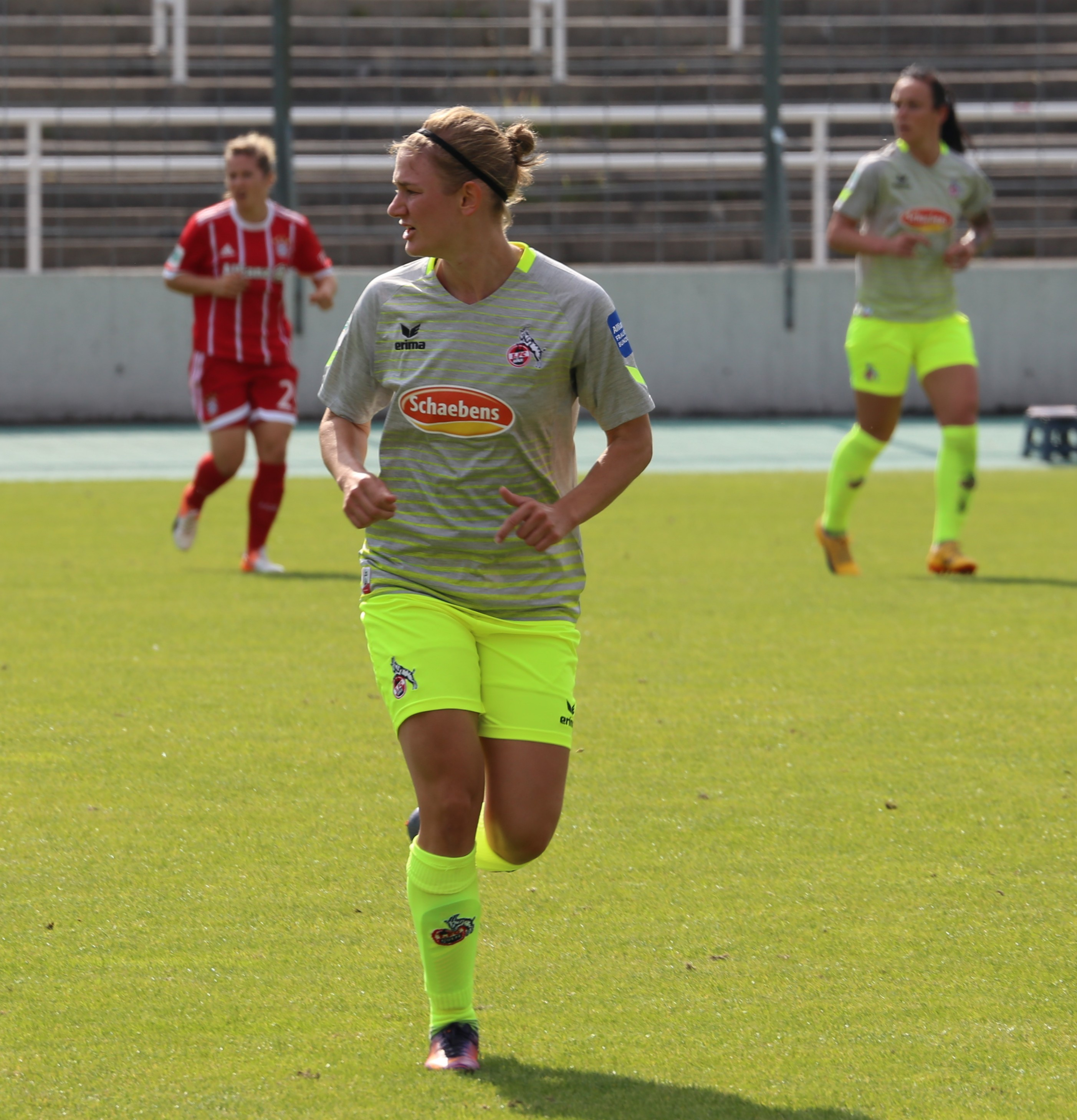 Carolin Schraa, 1. FC Köln, beim Frauen-Bundesliga-Spiel FC Bayern München gegen 1. FC Köln am 24. September 2017 im Stadion an der Grünwalder Straße (Ergebnis war 2:0)